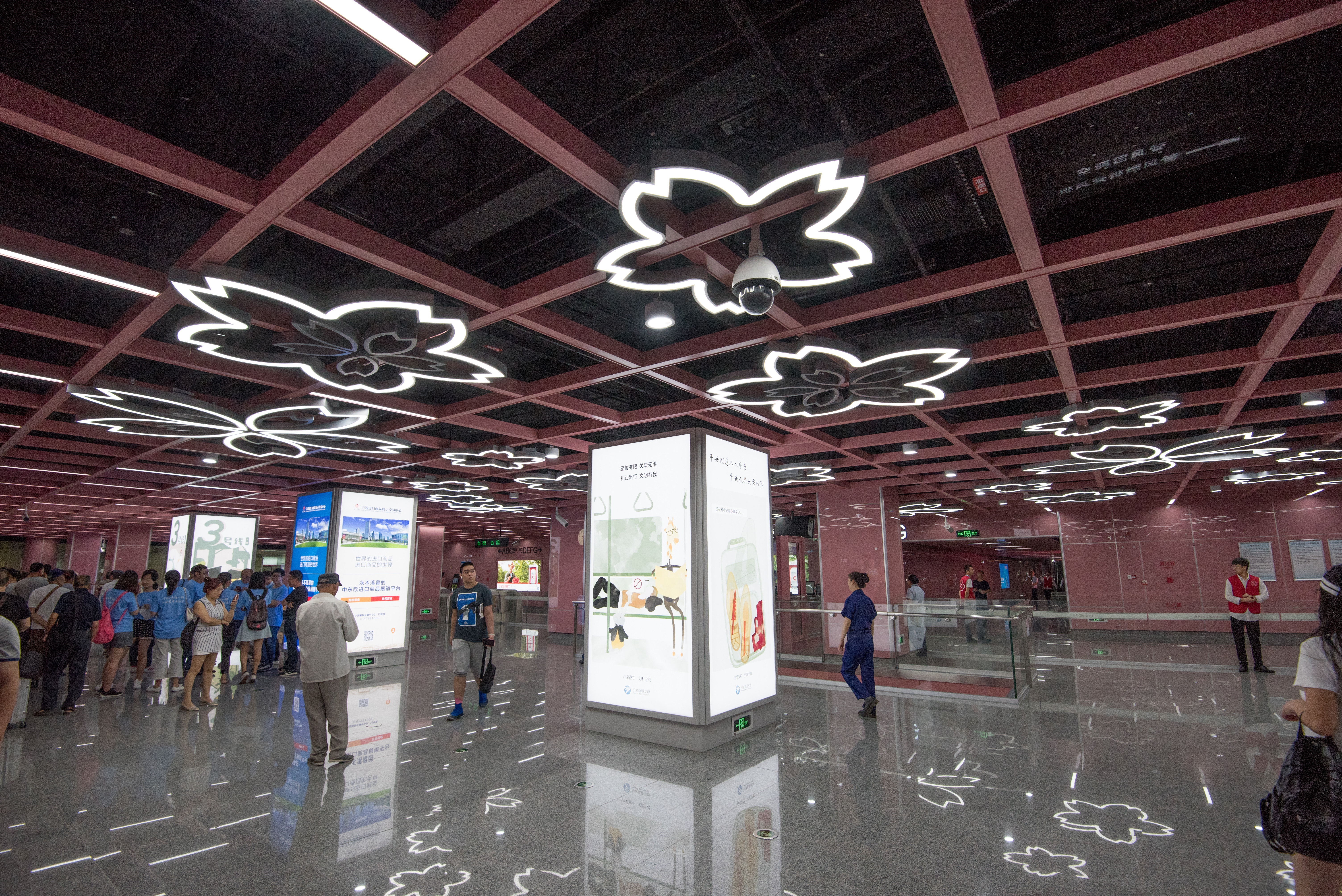 3号线樱花公园站